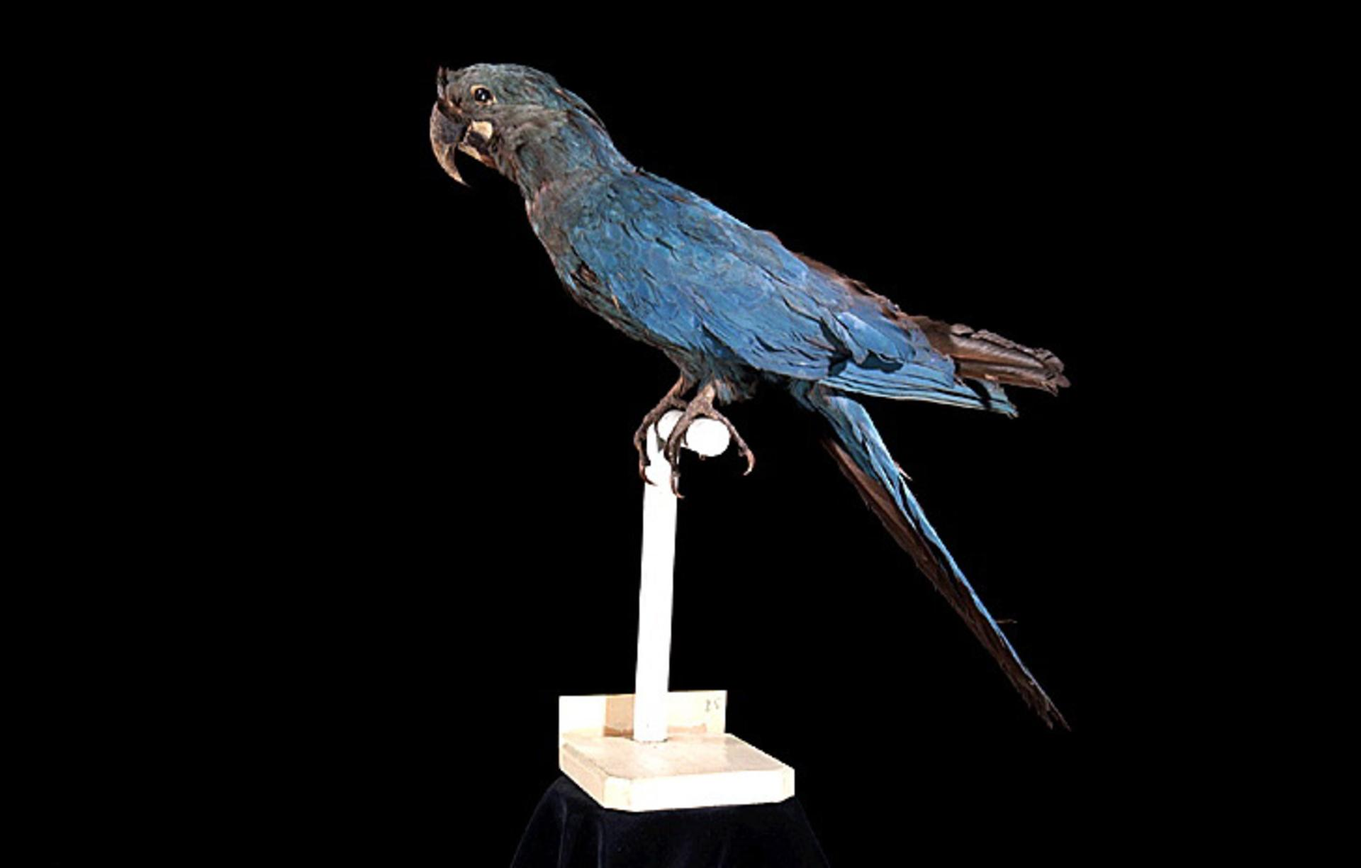 Anodorhynchus glaucus (Vieillot, 1816)